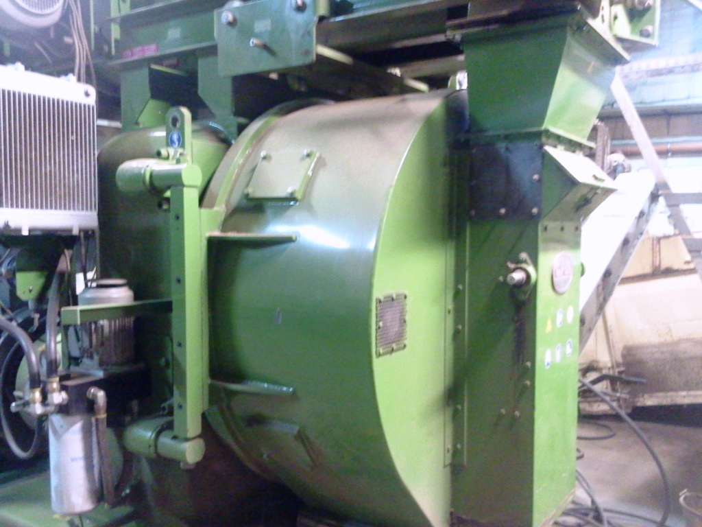 Prasa do produkcji peletu